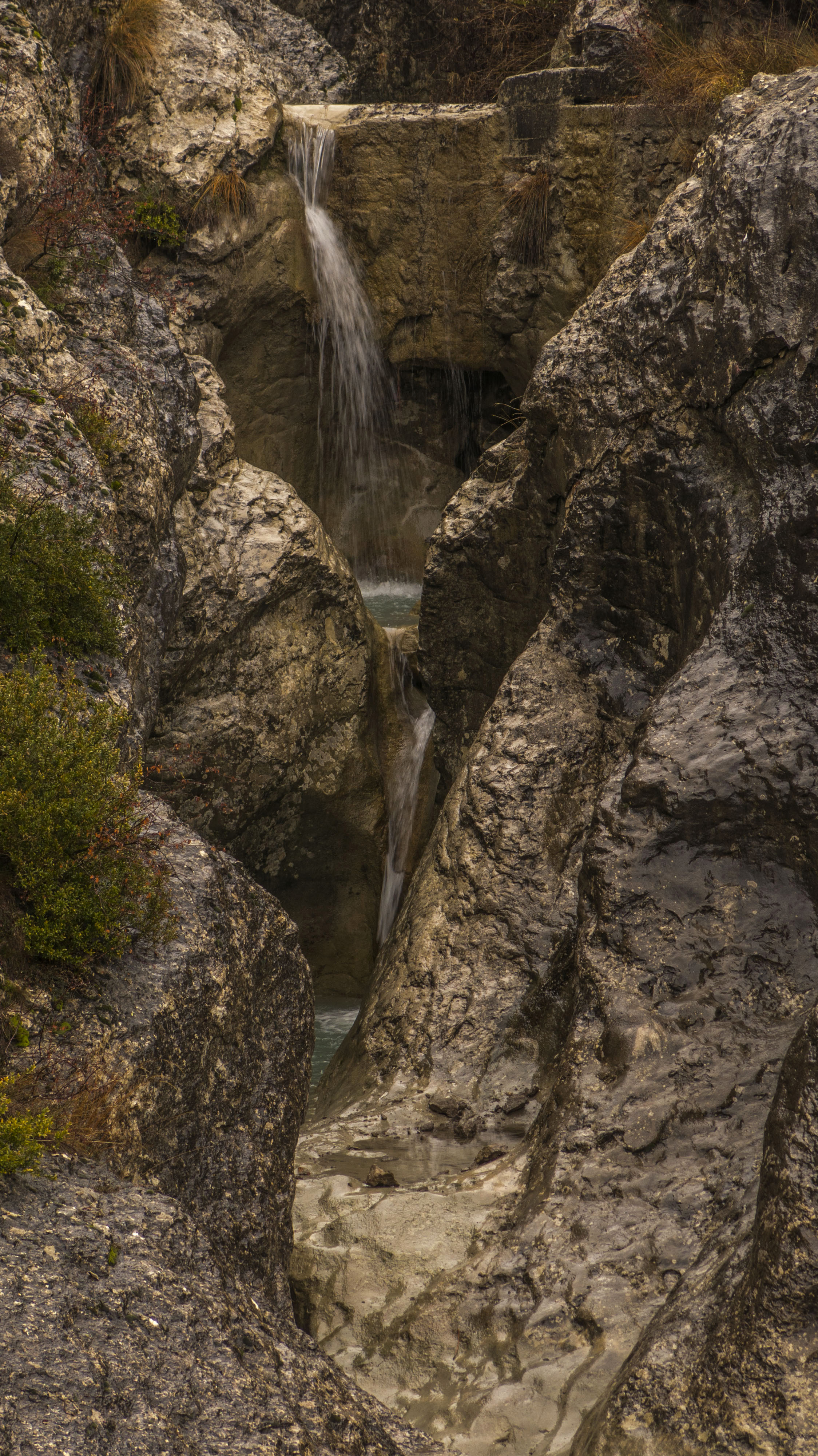 Petit congost del barranc de Carrasquer, afluent del riu Isàvena. Les aigüés del barranc de Carrasquer baixen cap a l'est entre la serra del Jordal i la serra d'Esdolomada, i desemboquen al riu Isàvena a la Pobla de Roda.